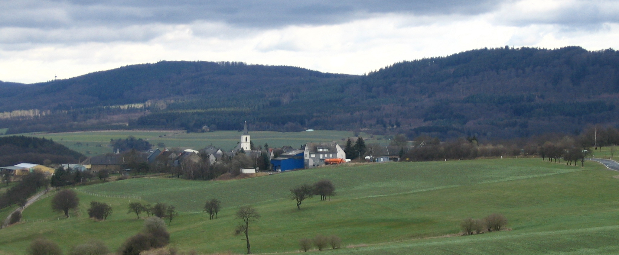 Schlierschied im Hunsrück, im Hintergrund der Soonwald mit der Ruine Koppenstein